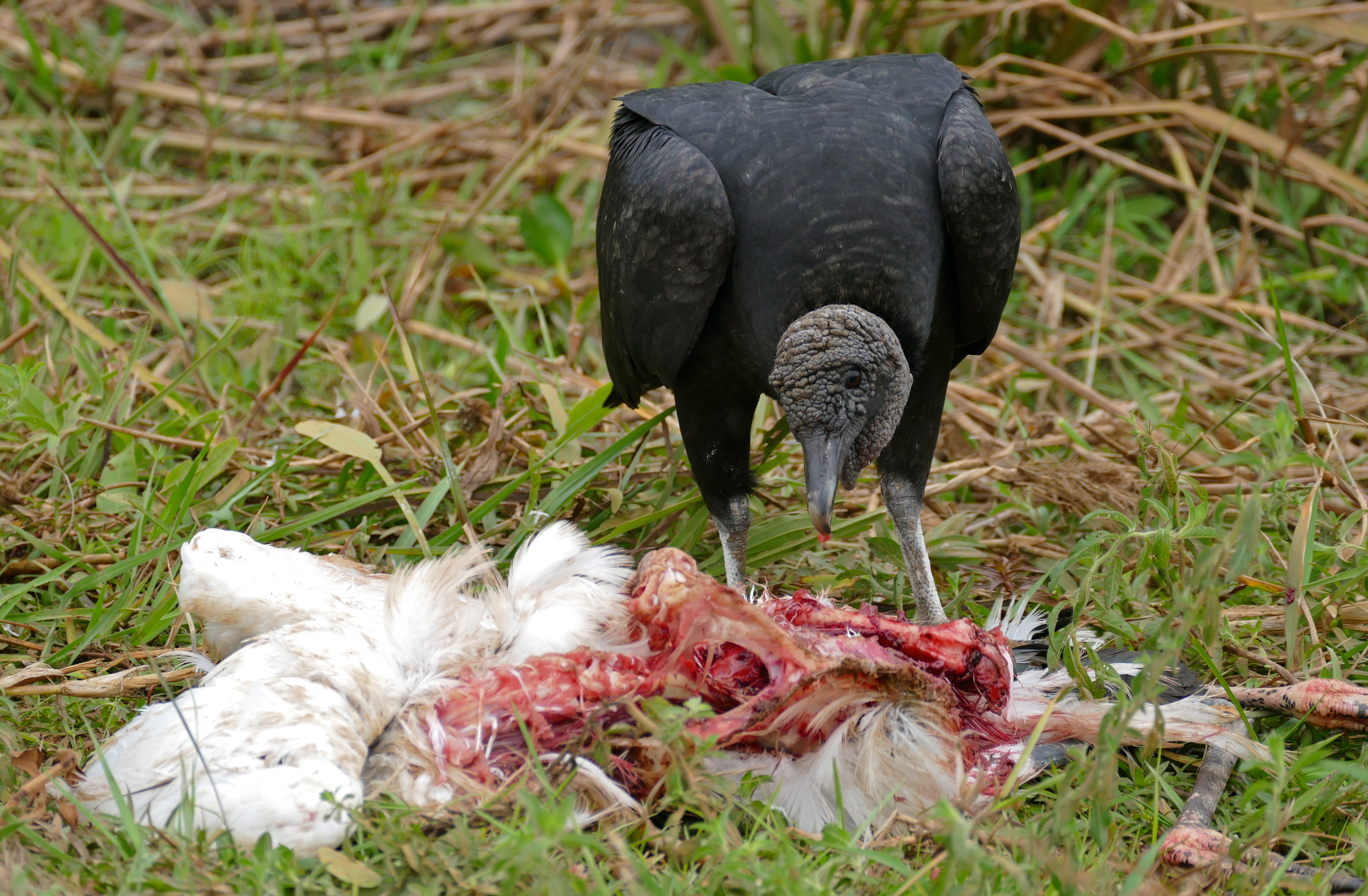 Transpantaneira, Poconé, Mato Grosso, BRAZIL